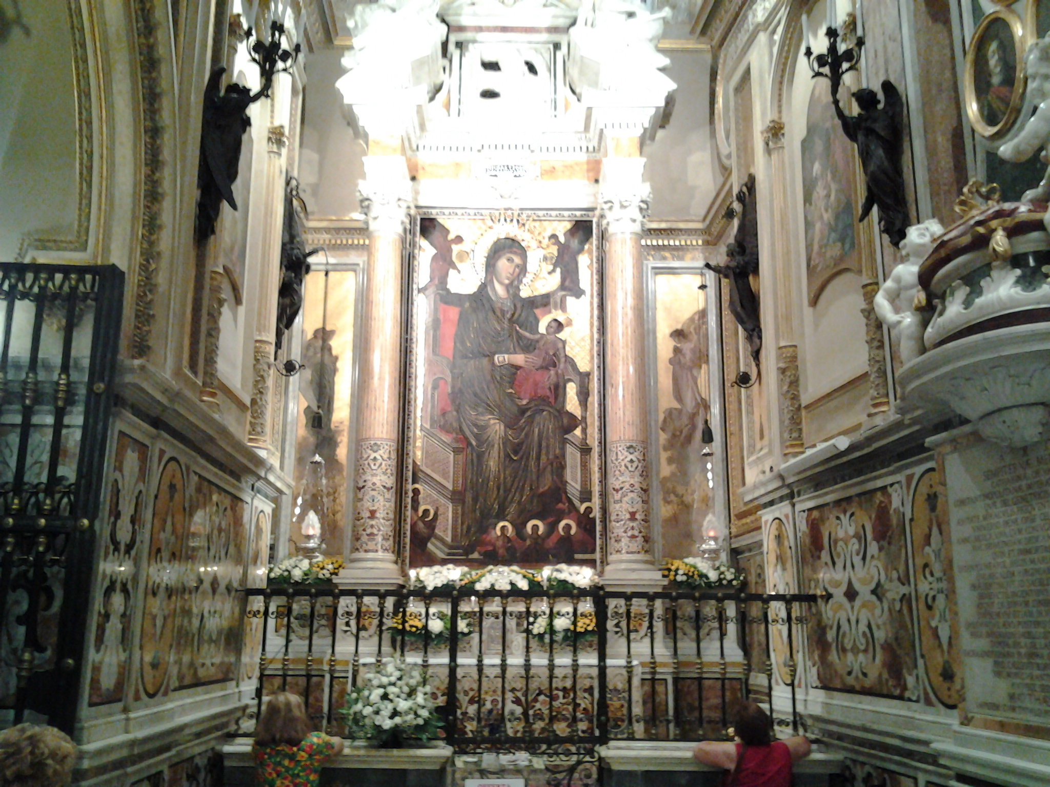 Icona della Madonna di Montevergine ricollocata nella sua antica cappella